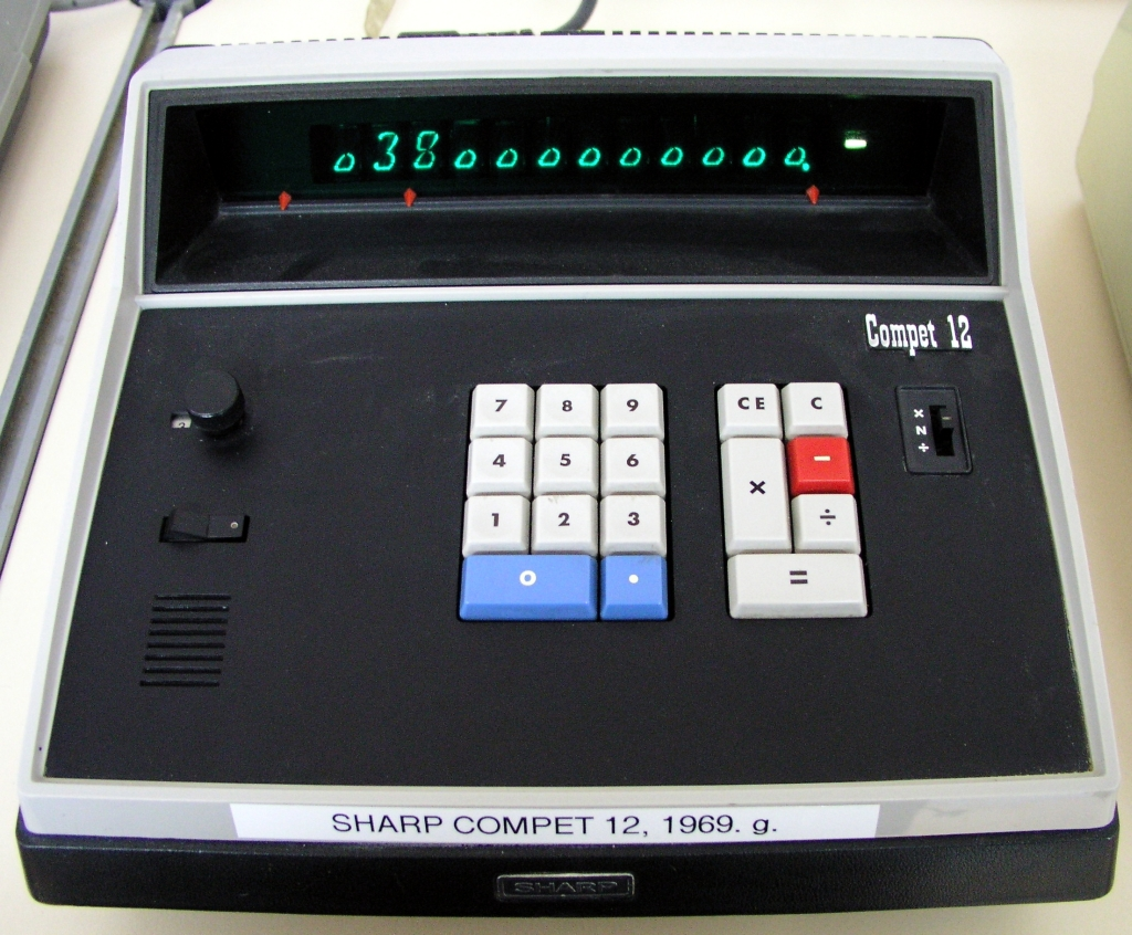 Sharp Complet 12 u muzeju PEEK&POKE u Rijeci